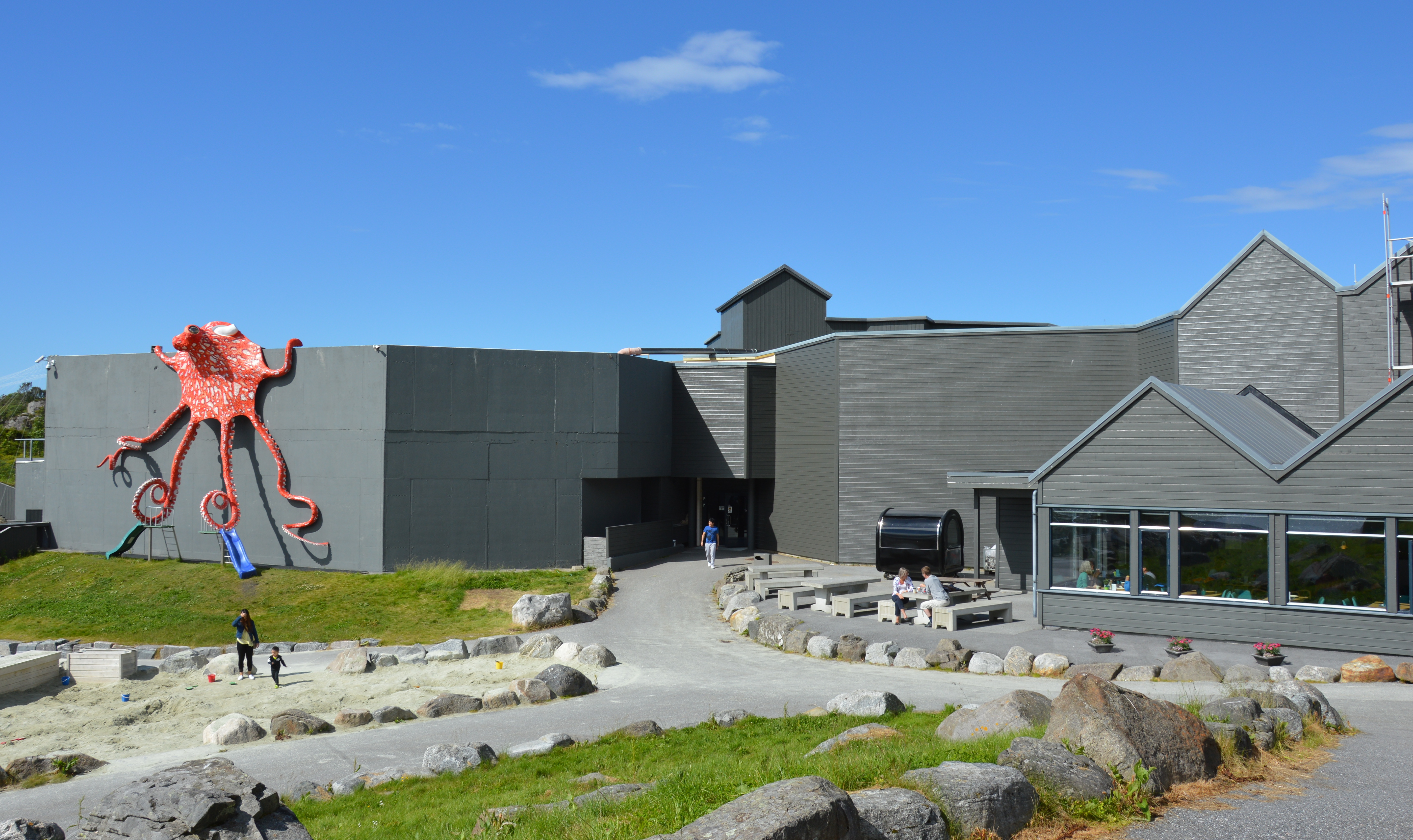 Atlantikpark Gebäude Alesund